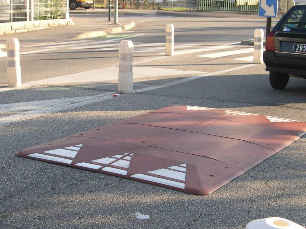 Coussin berlinois